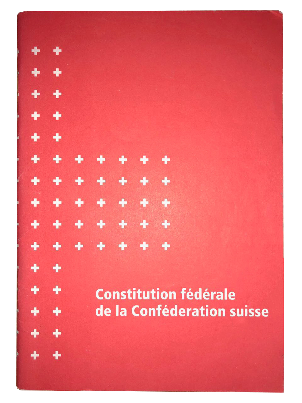 Couverture de la version francophone de la Constitution fédérale de la Confédération suisse de 1999.